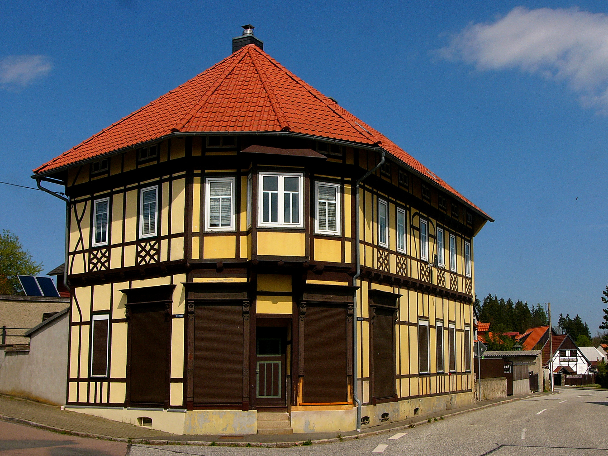 Wohnhaus in Fachwerkweise mit Jugendstilelementen, an einer Straßengabelung als point de vue, um 1700; Denkmalnr.: 094 84975.